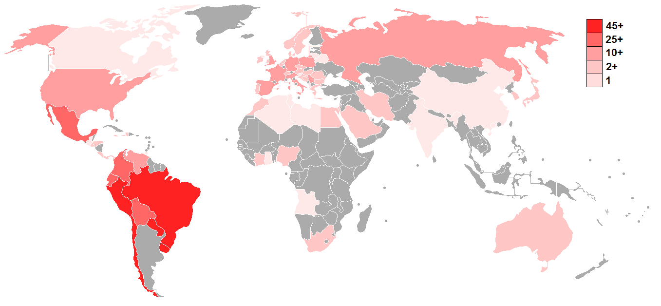 Historial de los partidos de Argentina